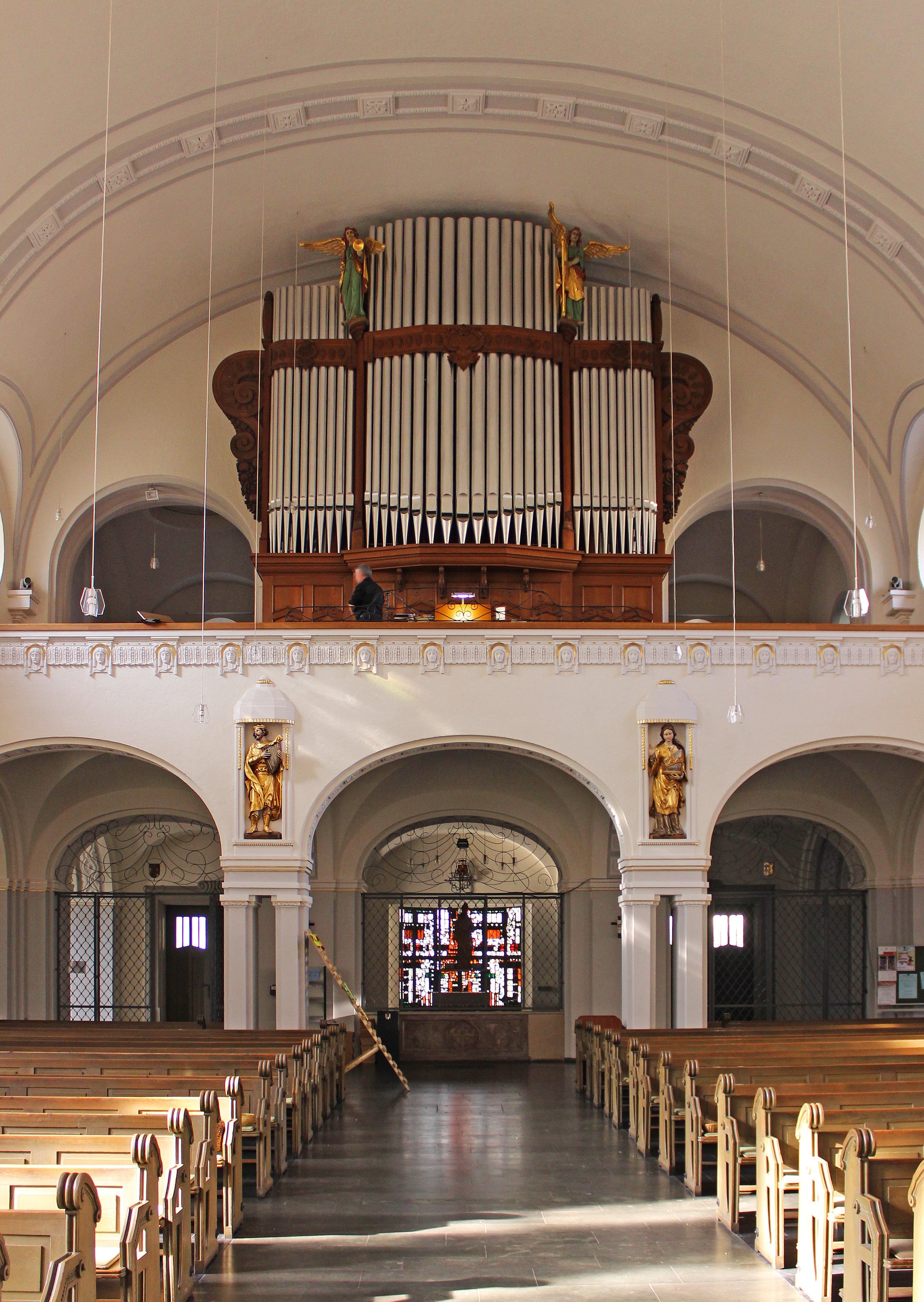 Orgelempore der katholischen Pfarrkirche St. Eligius in Völklingen, Saarland